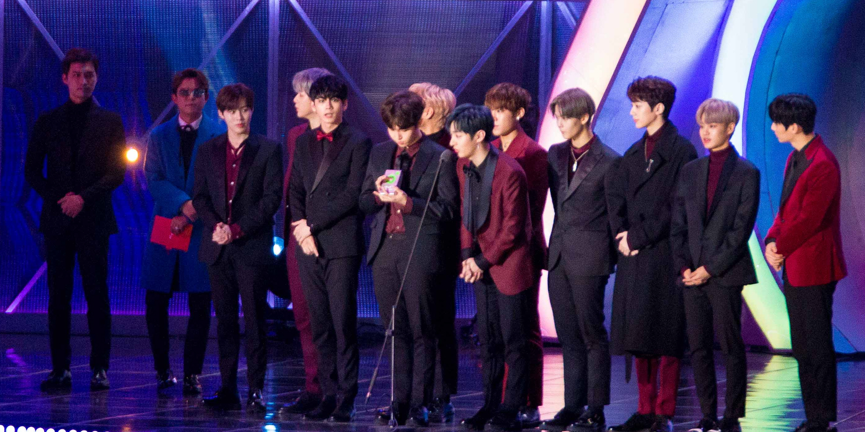 20171202 워너원 멜론뮤직어워드